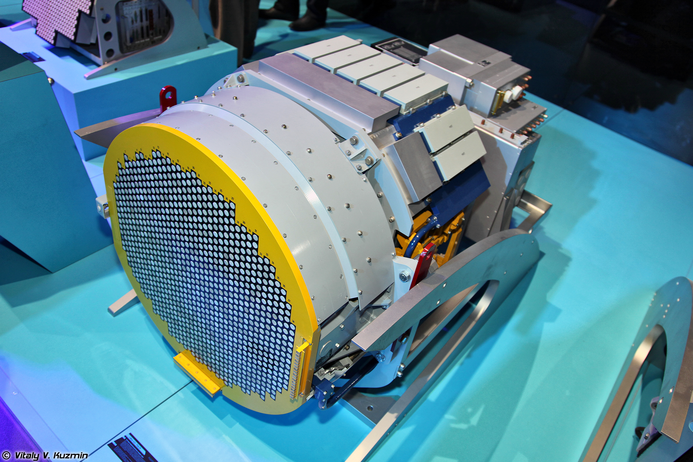 БРЛС с АФАР Жук-АЭ/FGA-29 (Zhuk-AE/FGA-29 radar)